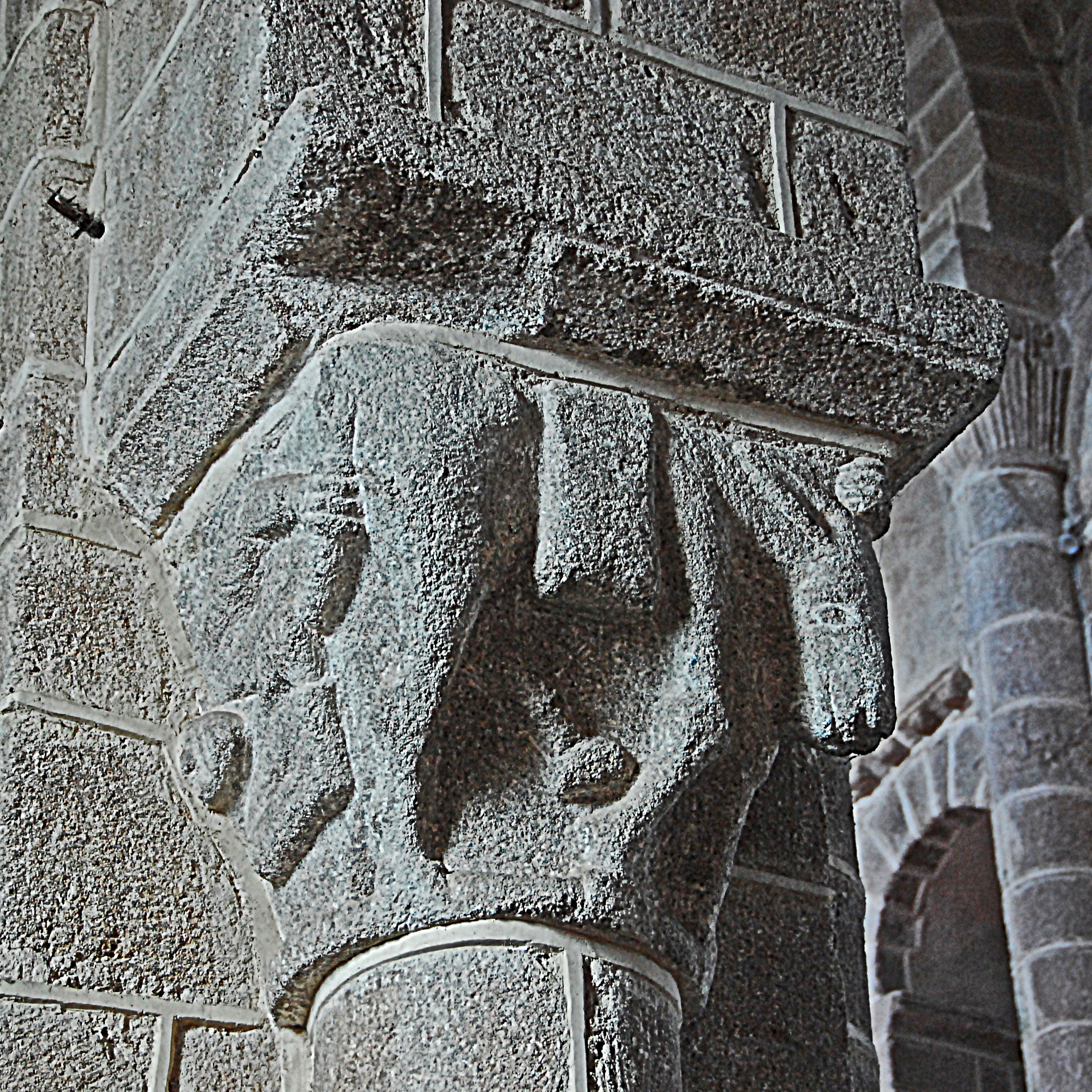 N.-D. de Châtel-Montagne, Kapitell Langhaus, Packesel